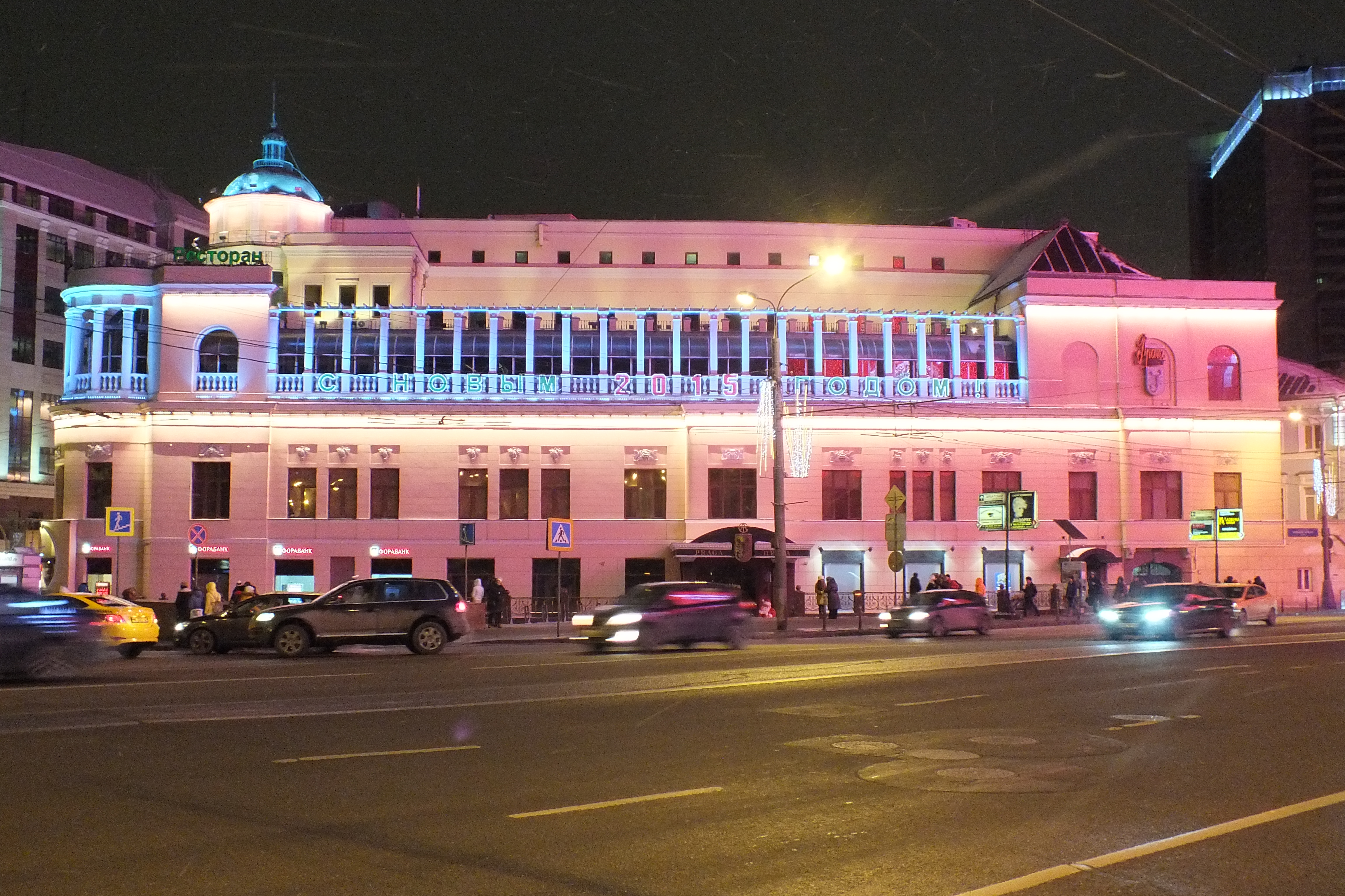 Вид на ресторан «Прага» в ночной подсветке (от улицы Новый Арбат).